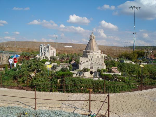 דגם